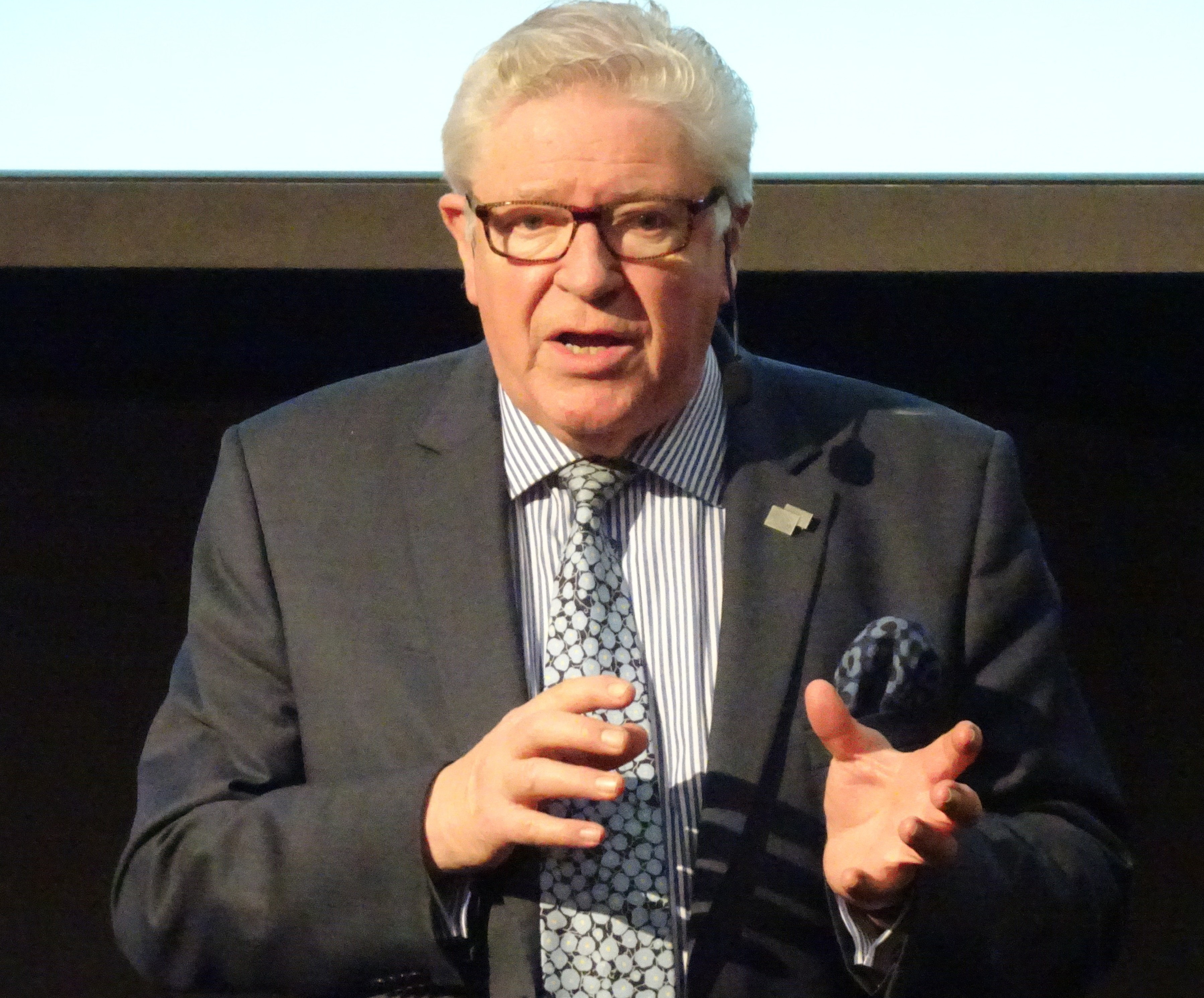 Antikhandlaren Bo Knutsson på Antikmässan i Älvsjö 2017